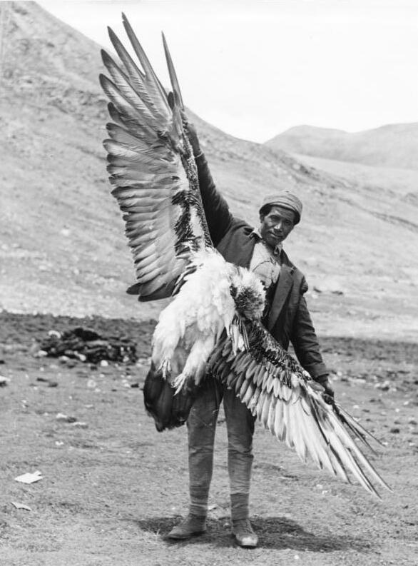 Tibetexpedition, Erlegter Schneegeier Gangtok, Scherpa mit erlegtem Himalajageier [Himalajageier, Himalayageier, Schneegeier] Information added by Wikimedia users.Die Beschreibung ist falsch, der Scherpa hält einen Bartgeier (Gypaetus barbatus). --Accipiter (talk) 15:05, 30 December 2010 (UTC) Wrong species, it's a Bearded Vulture (Gypaetus barbatus). --Accipiter (talk) 15:05, 30 December 2010 (UTC)